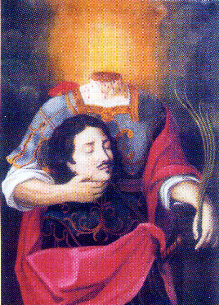 Santino di San Donnino. Patrono della diocesi di Fidenza (Parma) Quadro del primo 1600 raffigurante il santo martire decapitato.